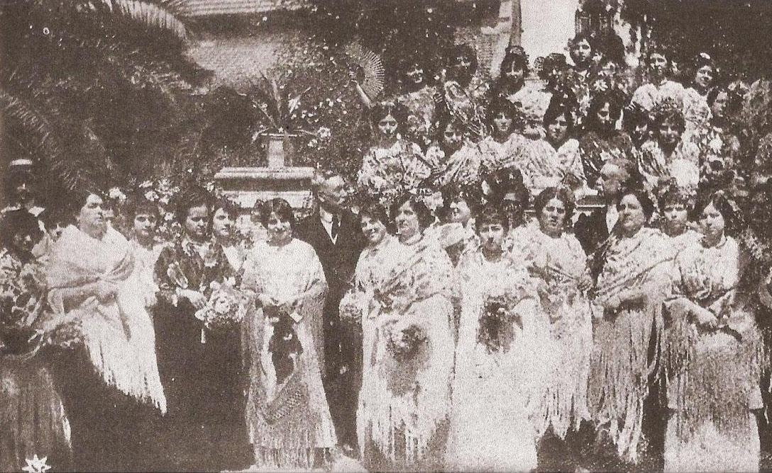 Gonzalo Bilbao junto a un grupo de cigarreras sevillanas en Sevilla como homenaje al pintor en 1915, a su vuelta de la Exposición Nacional de Madrid.